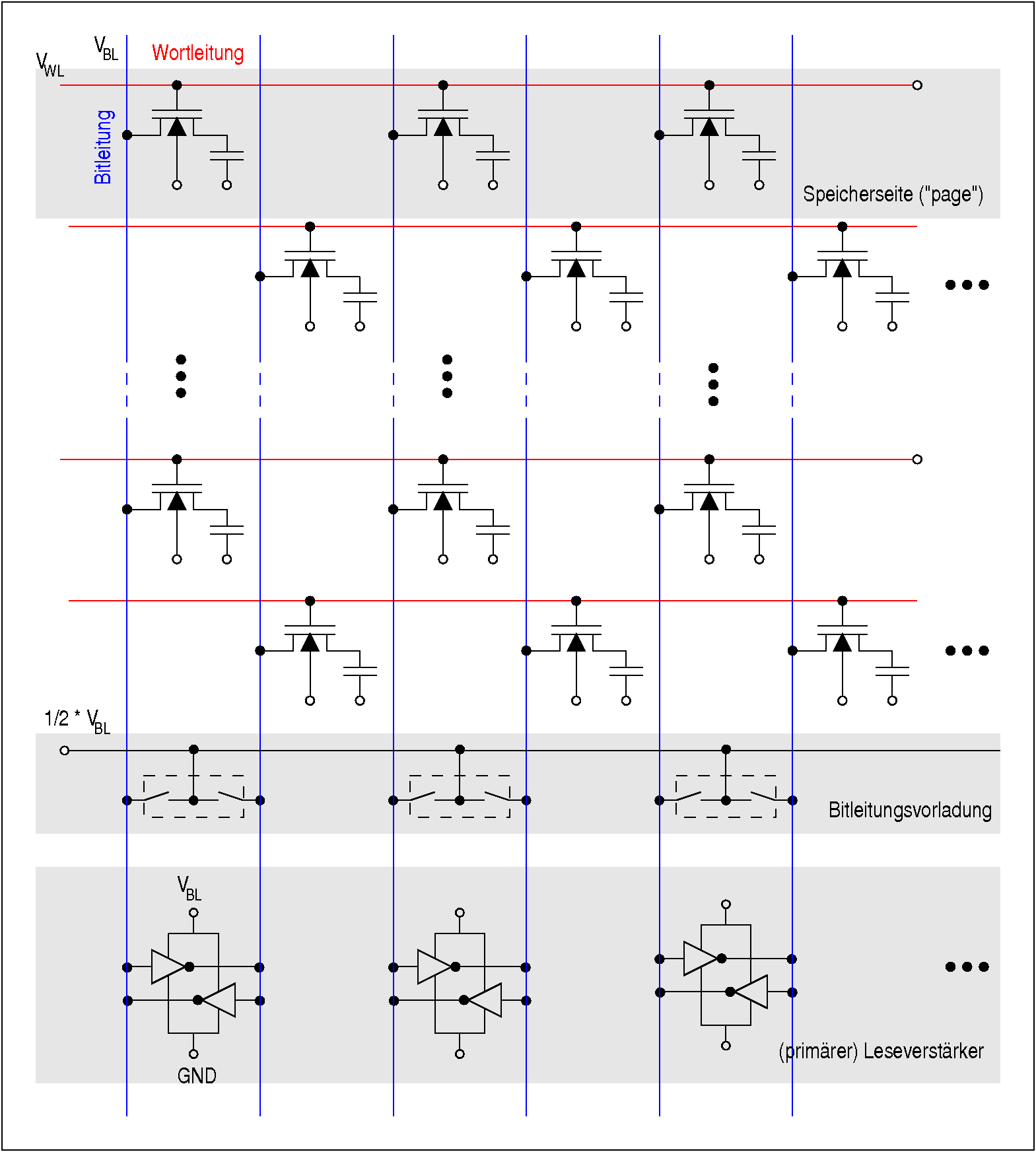 Prinzipieller Aufbau eines DRAM-Zellenfeldes